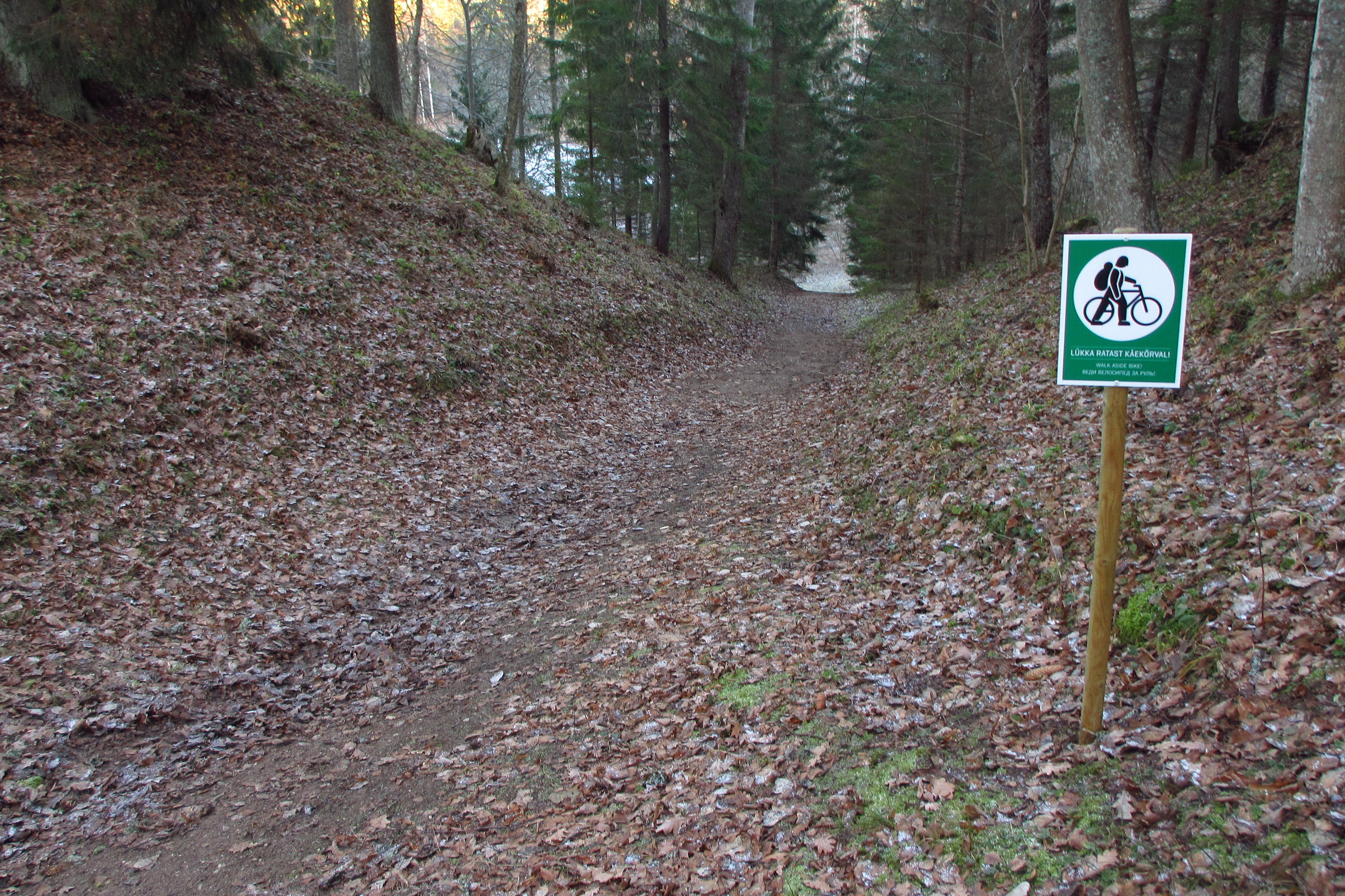 Neeruti mäed Neeruti MKA-l